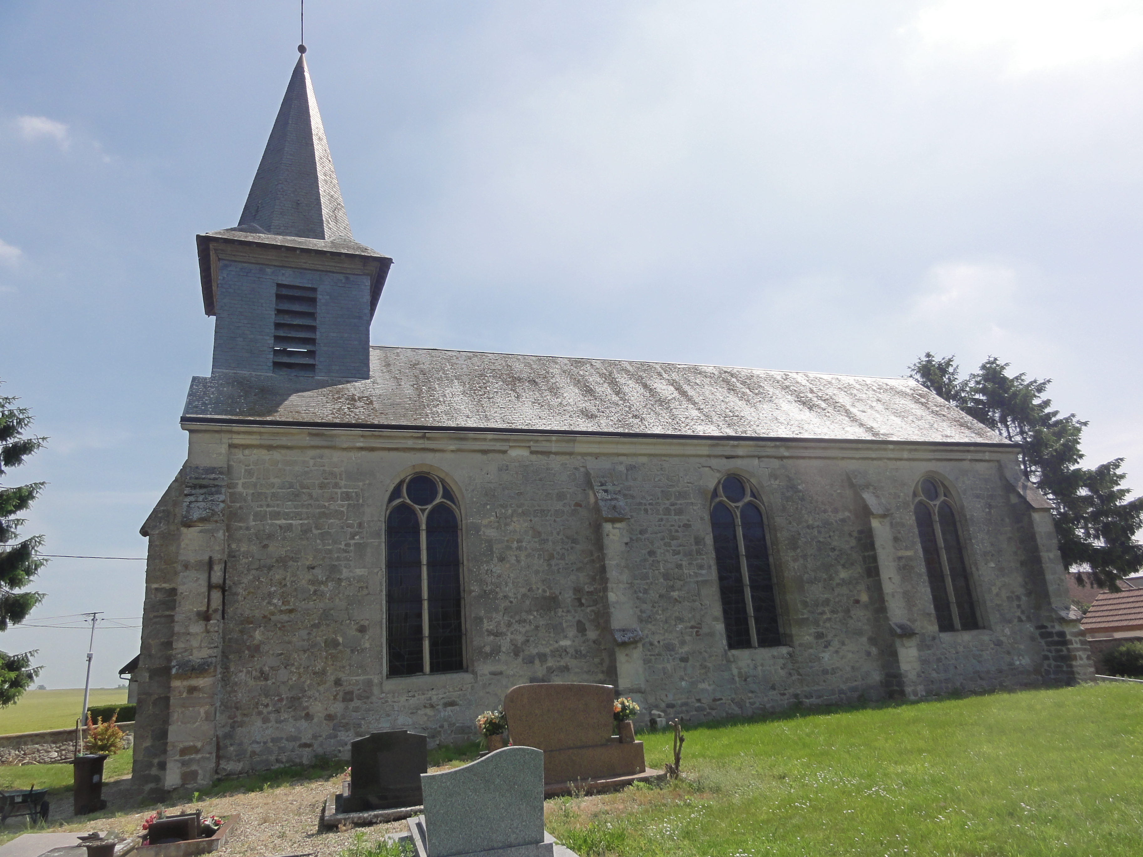 Cuiry-lès-Chaudardes (Aisne) Église